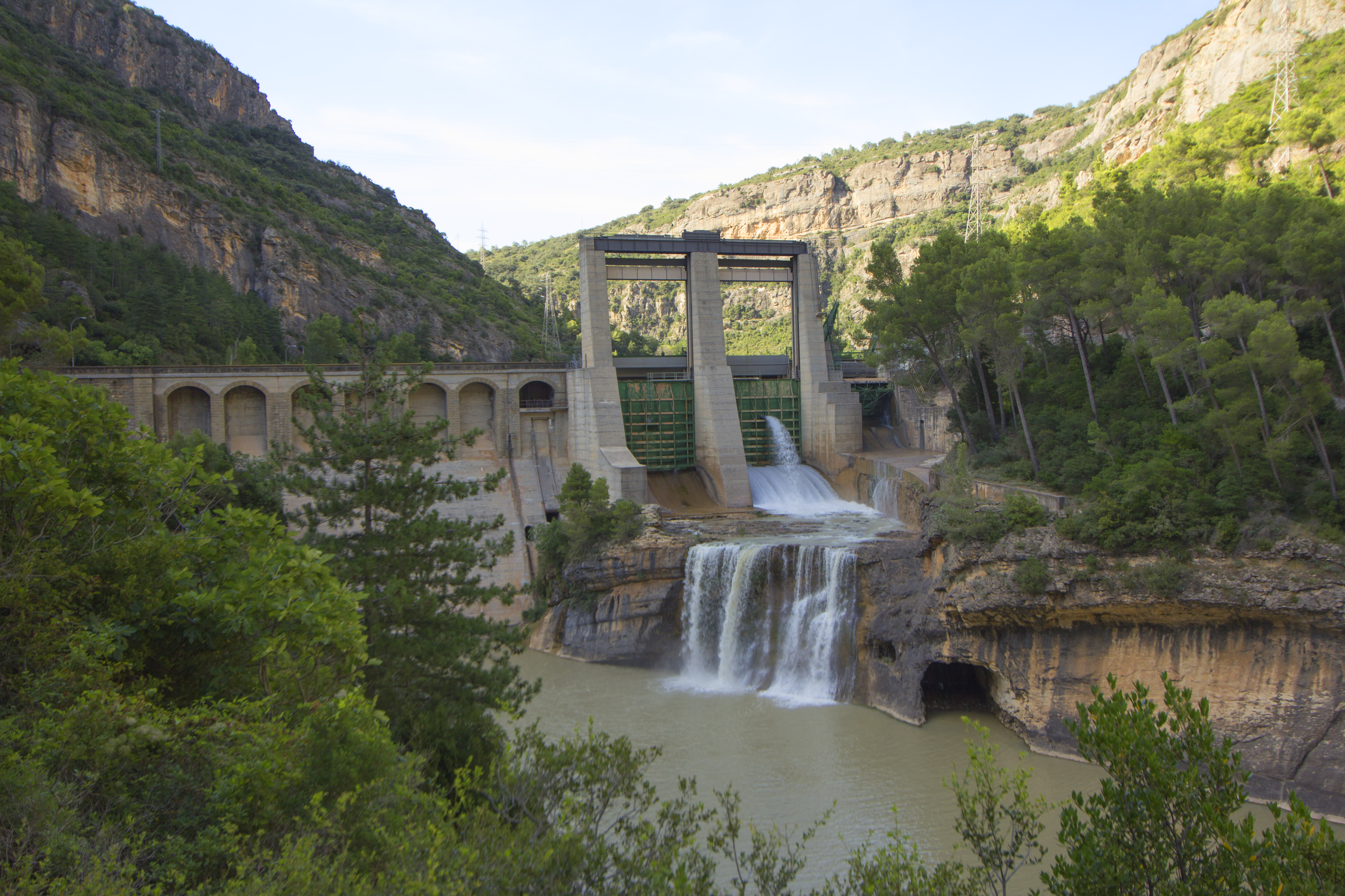 Presa de l'embassament de Terradets (Pallars Jussà)